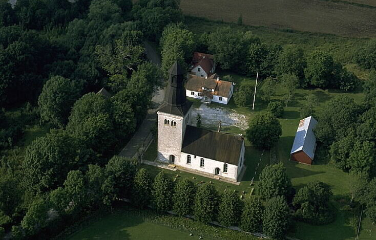 Kyrkan från syd. Motiv: Ala kyrka Nyckelord: Flygbilder, Riksintressen Kategori: Kyrkomiljö Kyrkan från syd.